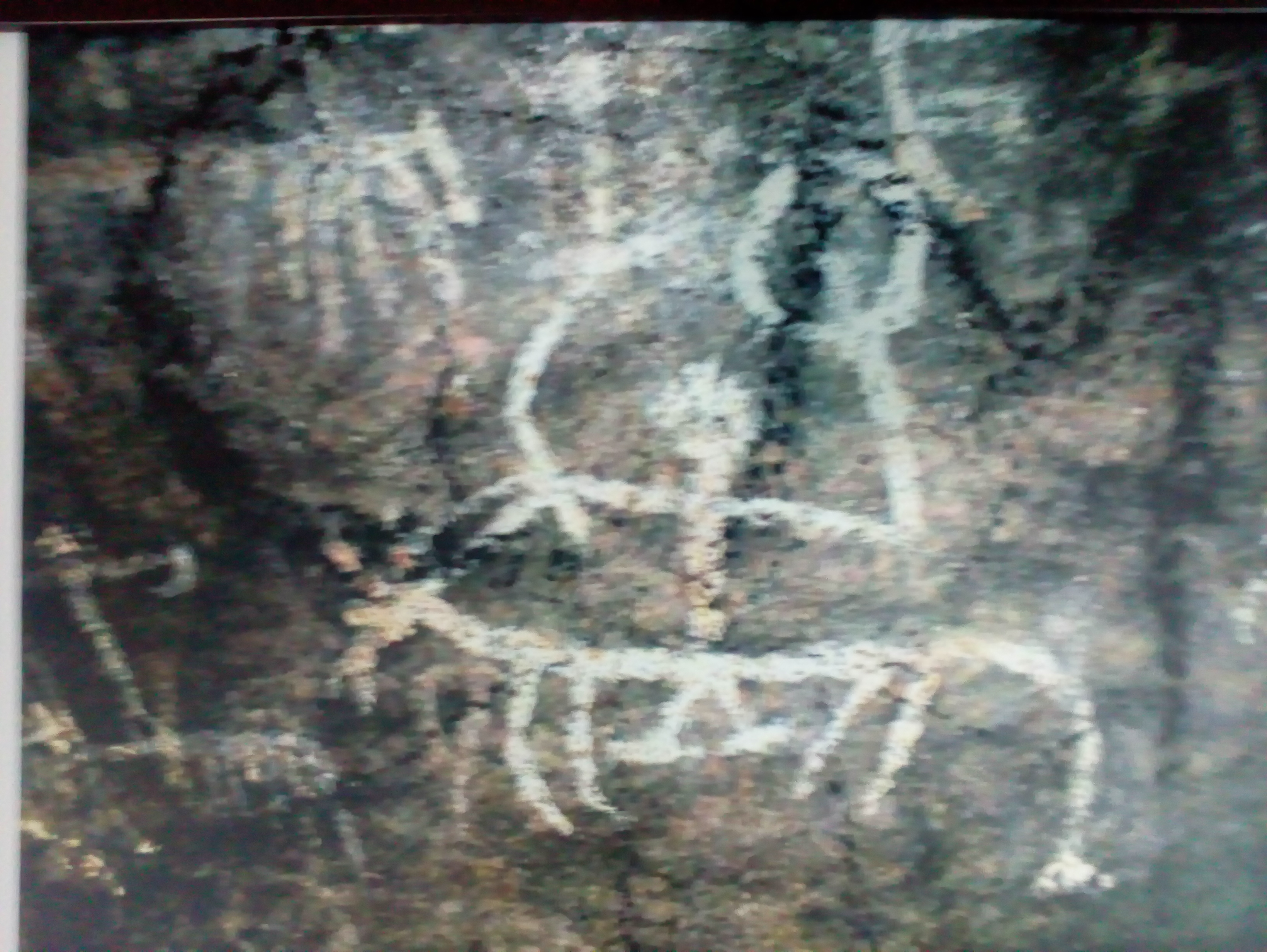 மாவீரன்